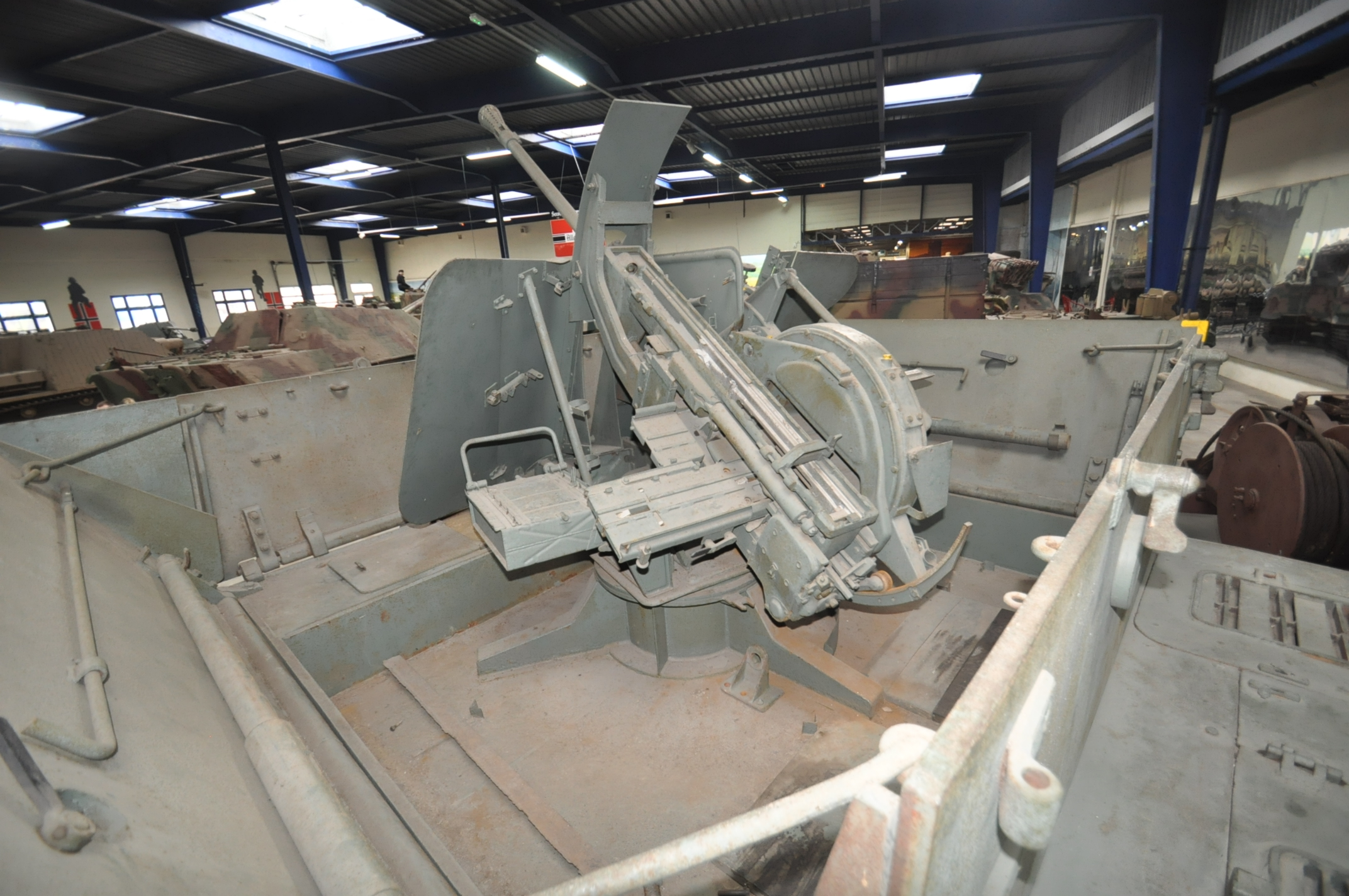 メーベルワーゲン搭載3.7cm FlaK43のプラットホーム